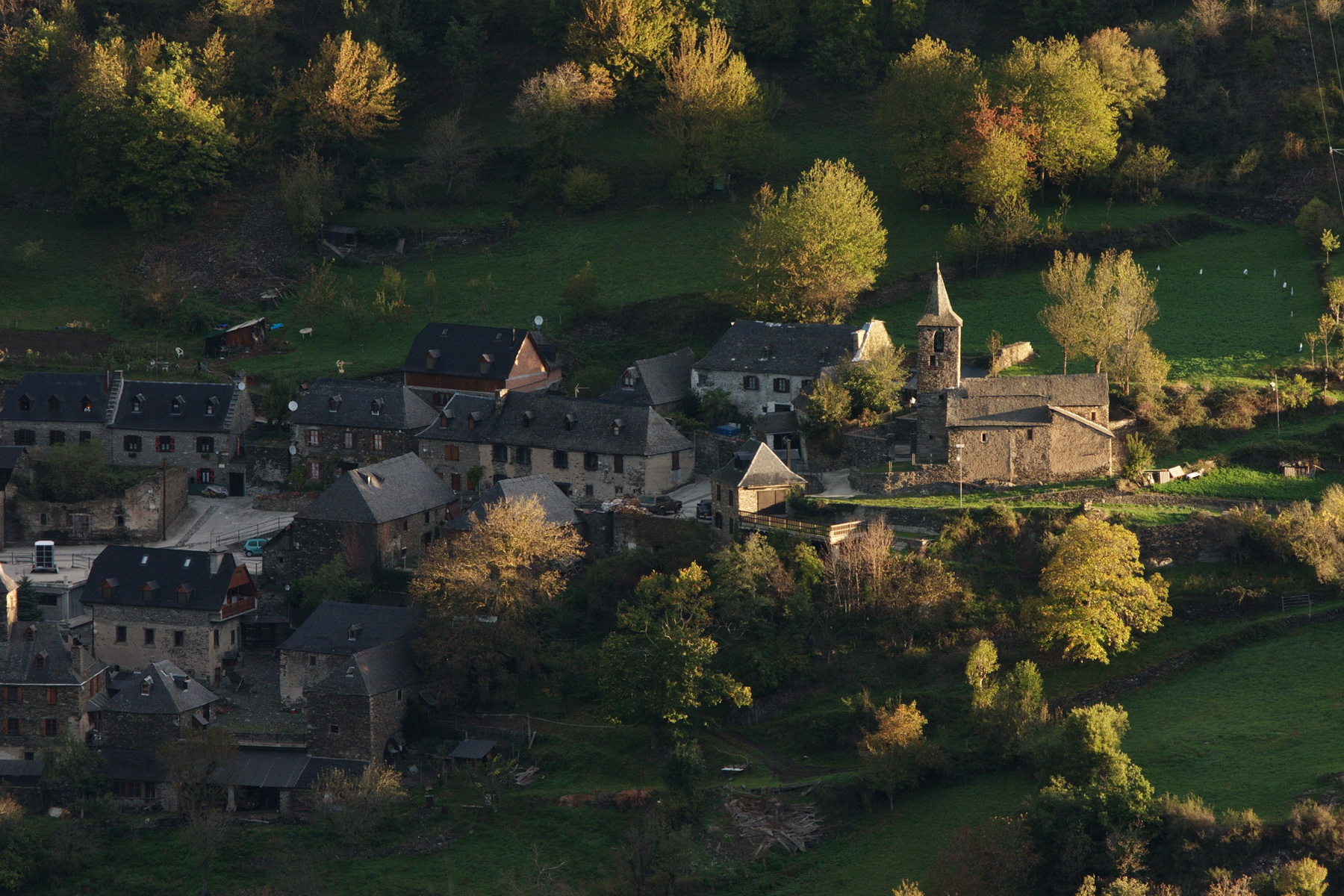 Es Bòrdes